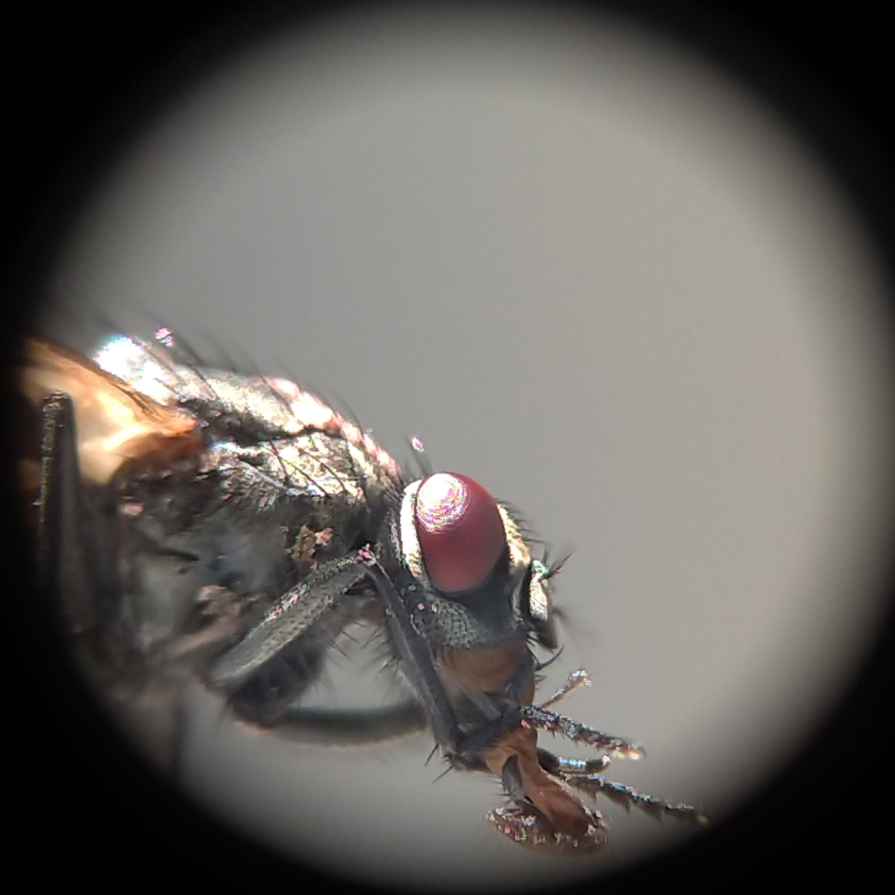 MakroAufnahmeFliegeUnbekanntSaugruesselAmPutzen